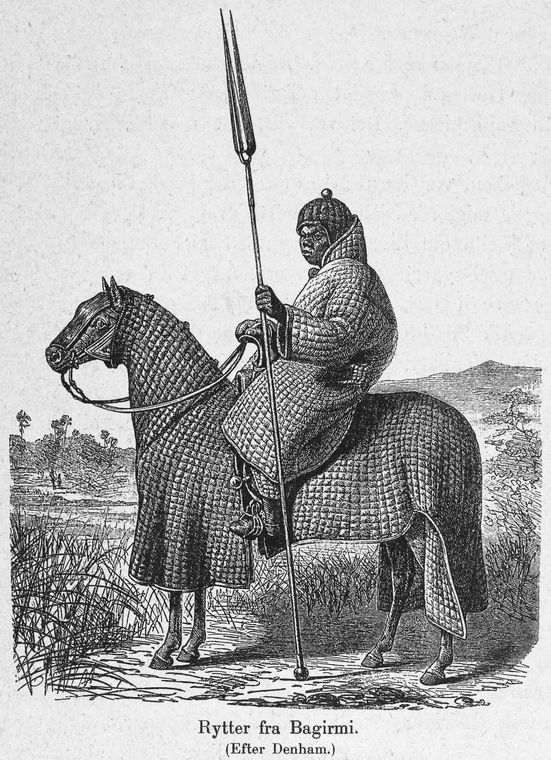 Rytter fra Bagirmi. From Afrika; dets opdagelse, erobring og kolonisation. Populaert frematillet (published 1901).